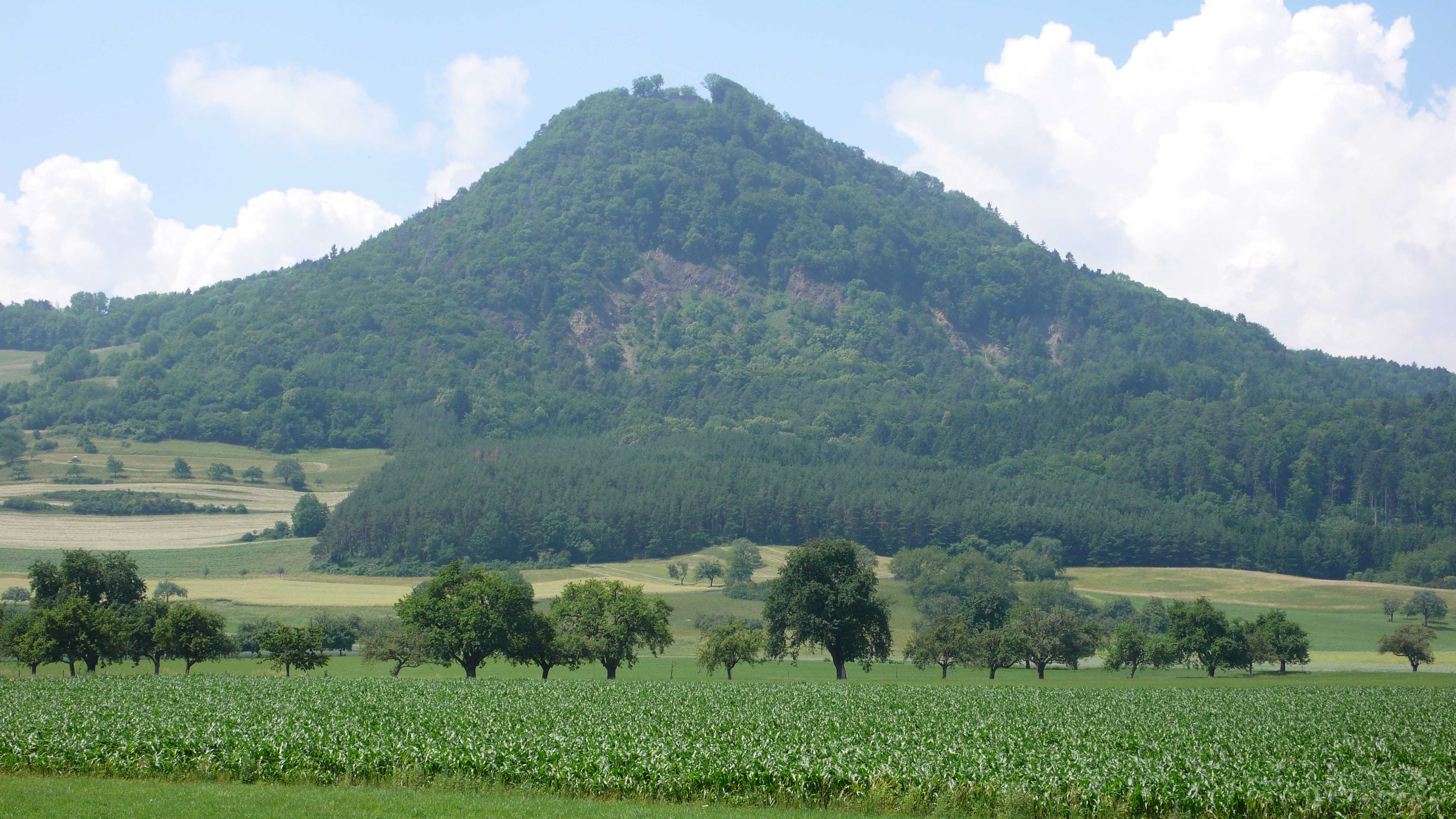 Hohenhewen, Mountain, Germany